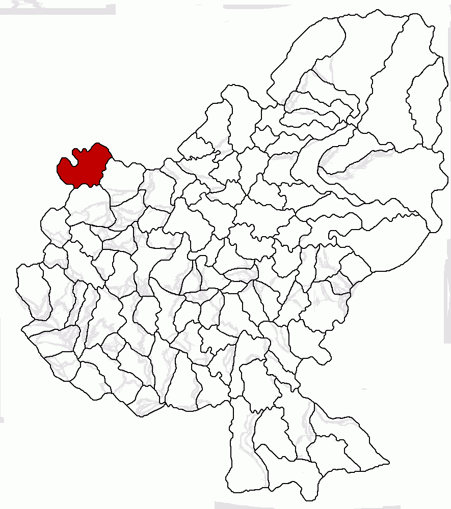 Categorie:Hărţi ale judeţului Mureş